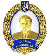 Нагрудний знак МОН України «Василь Симоненко»